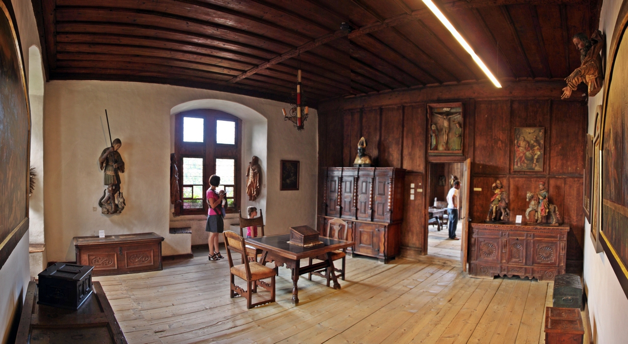 Feldkirch (Vorarlberg), Schattenburg: Blick in das Gotische Zimmer.